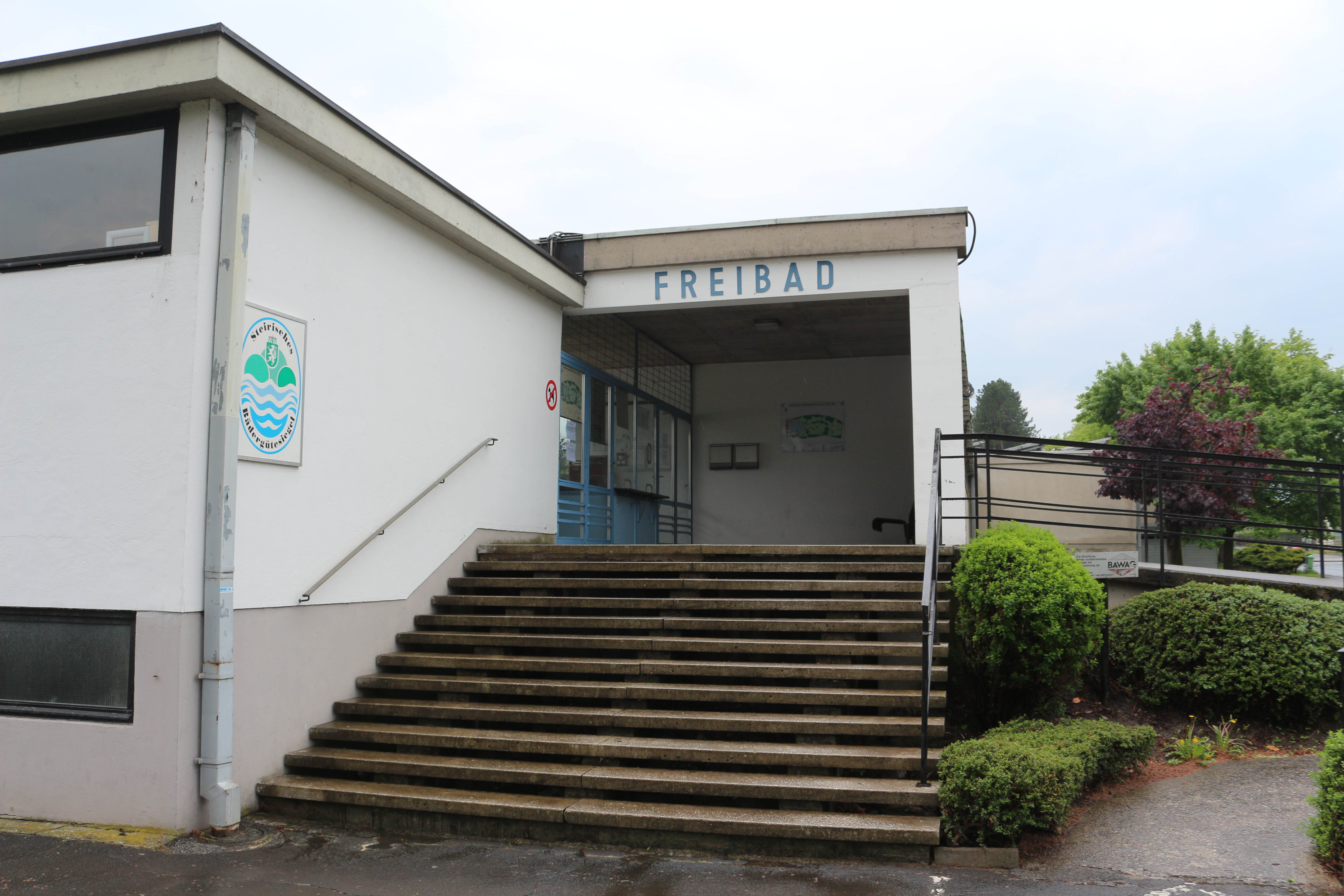 Freibad Bruck an der Mur; Vorderseite (Eingangsbereich)